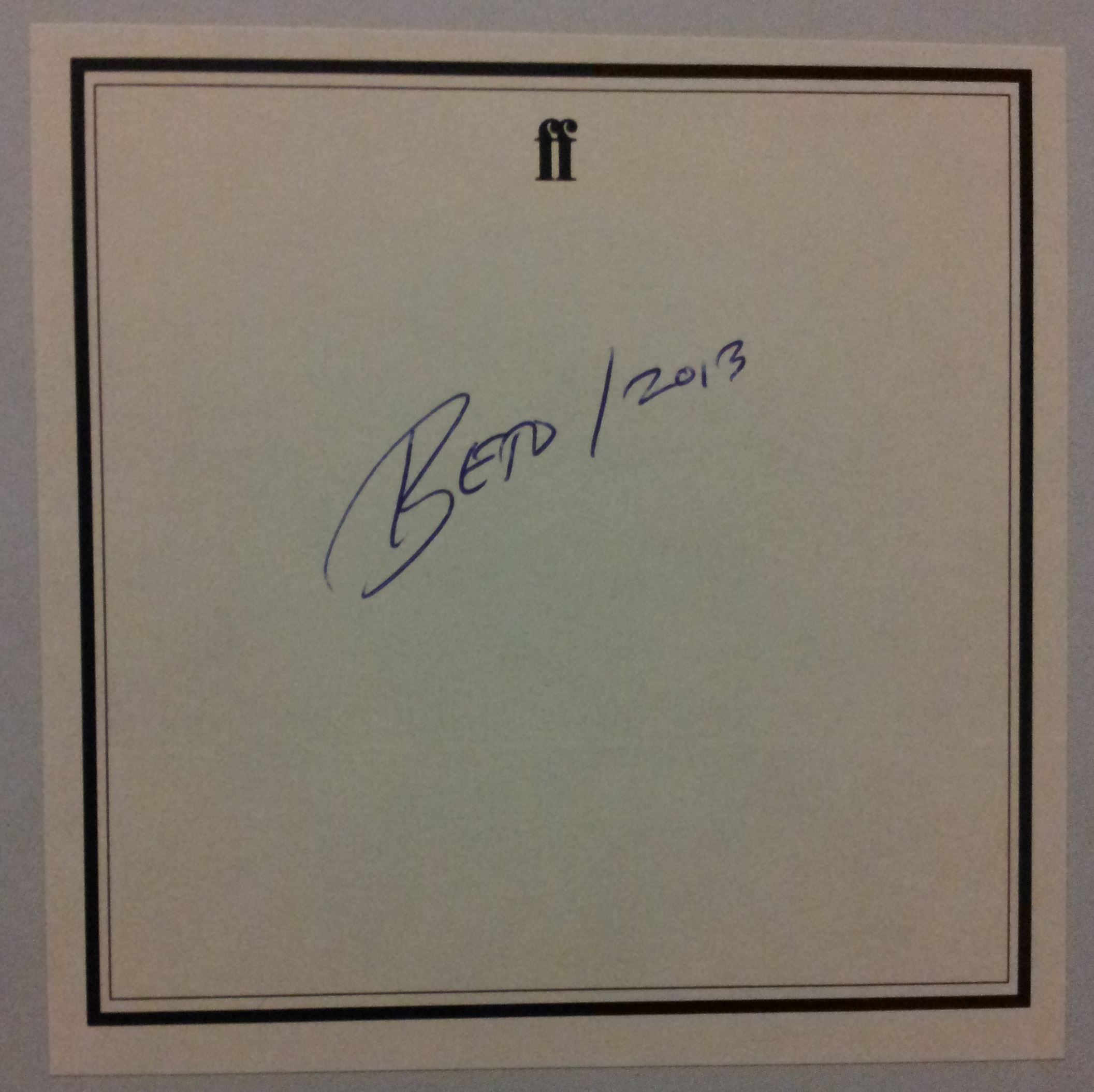 Ex-libris a "Marble Season" (Fantagraphics)